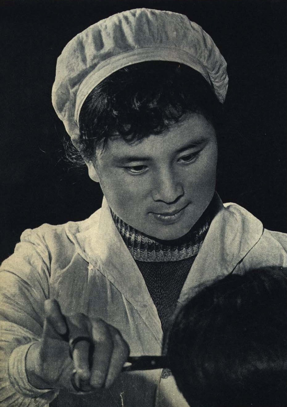 1962-04 1962年 理发师查桂民